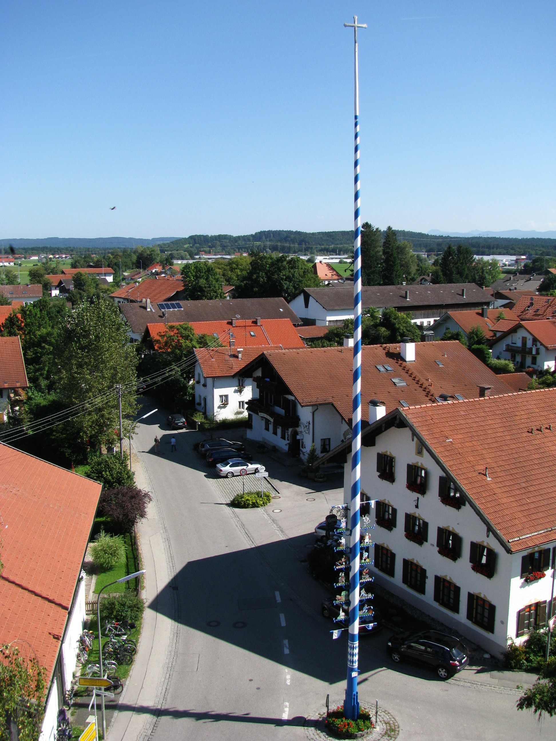 Gelting; Ausblick vom Kirchturm nach Osten.